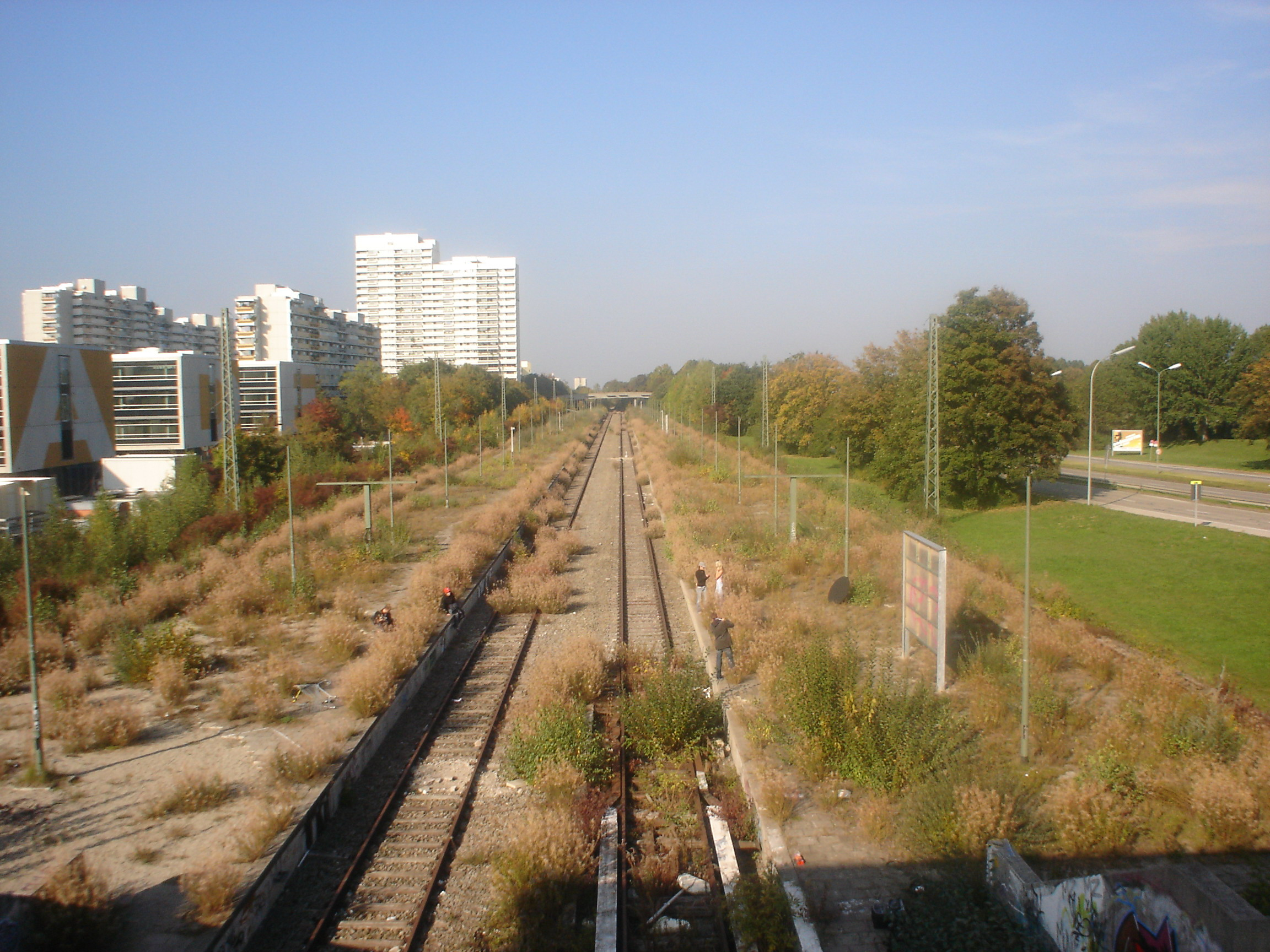 Bahnhof München Olympiastadion, Blick auf die Bahnsteige